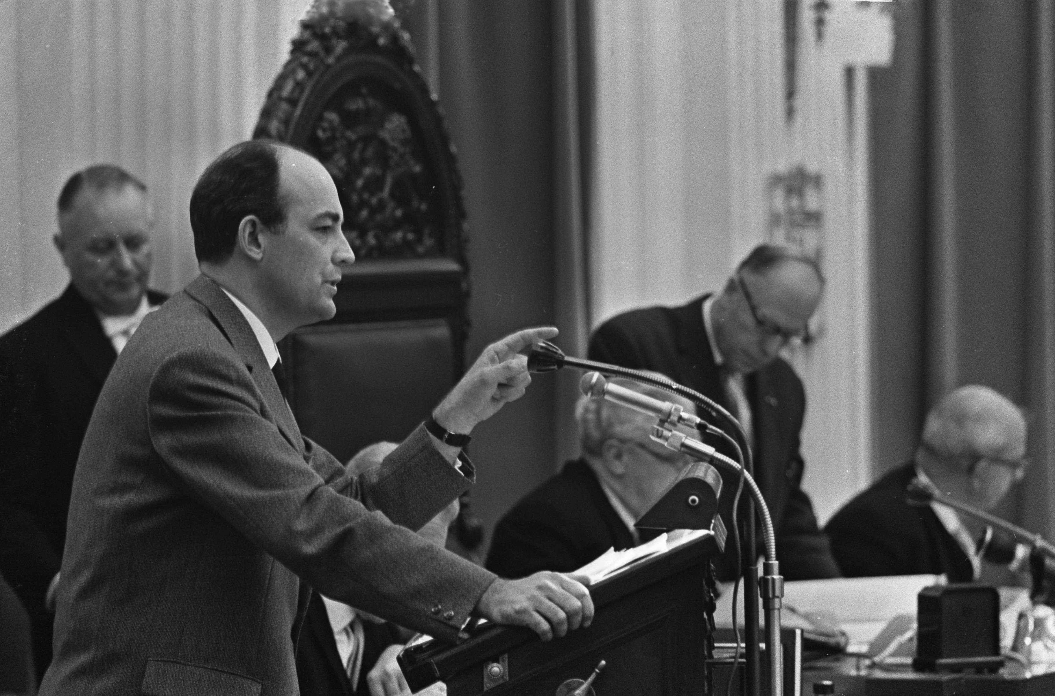 Collectie / Archief : Fotocollectie Anefo Reportage / Serie : Behandeling van de huurwet in de Tweede Kamer Beschrijving : Willem Aantjes (ARP) aan het woord Datum : 26 oktober 1965 Locatie : Den Haag, Zuid-Holland Trefwoorden : parlementaire debatten, parlementariërs, woonbeleid Persoonsnaam : Aantjes, Willem Instellingsnaam : ARP Fotograaf : Fotograaf Onbekend / Anefo Auteursrechthebbende : Nationaal Archief Materiaalsoort : Negatief (zwart/wit) Nummer archiefinventaris : bekijk toegang 2.24.01.05 Bestanddeelnummer : 918-3640